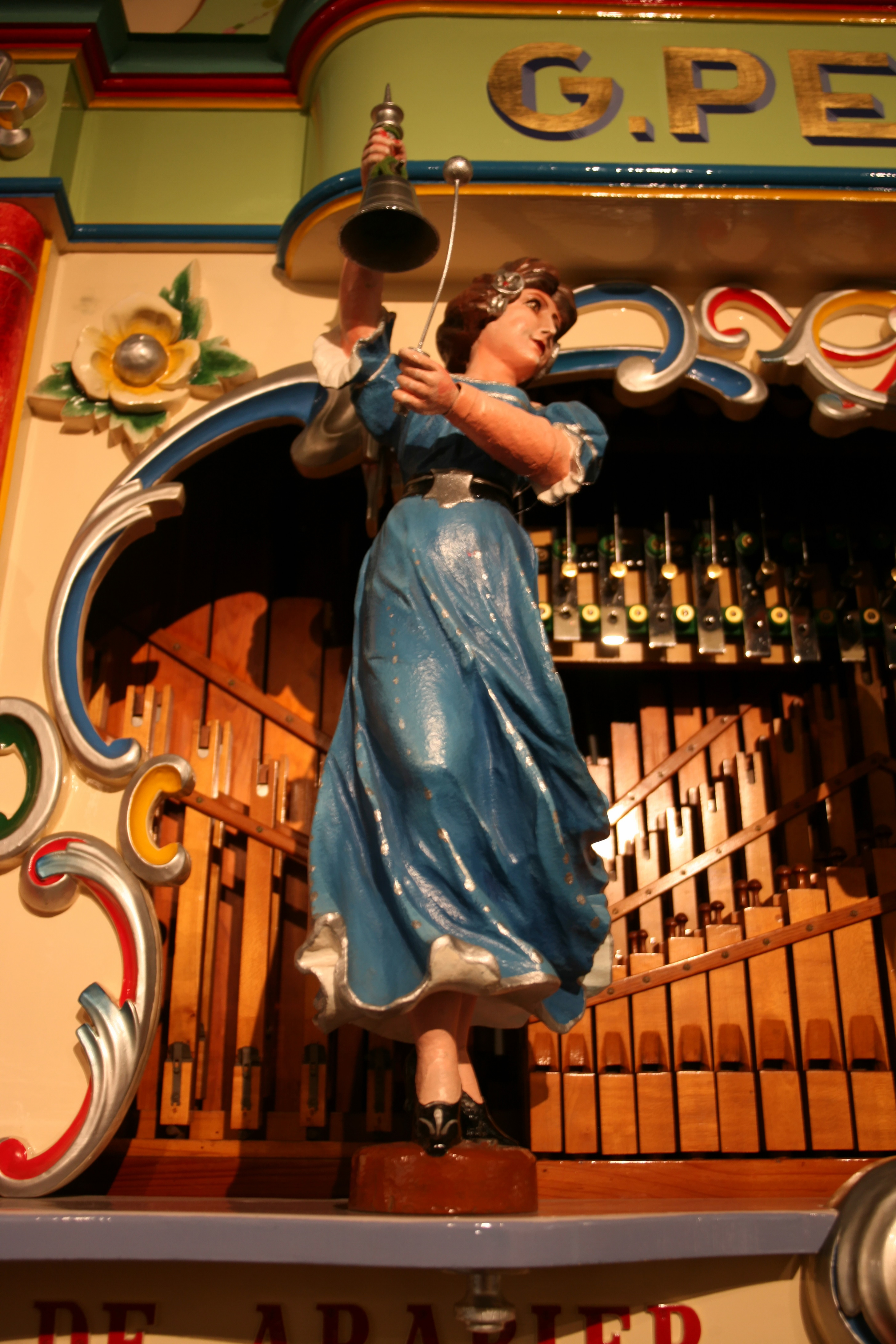 museum speelklok tot pierement (224)